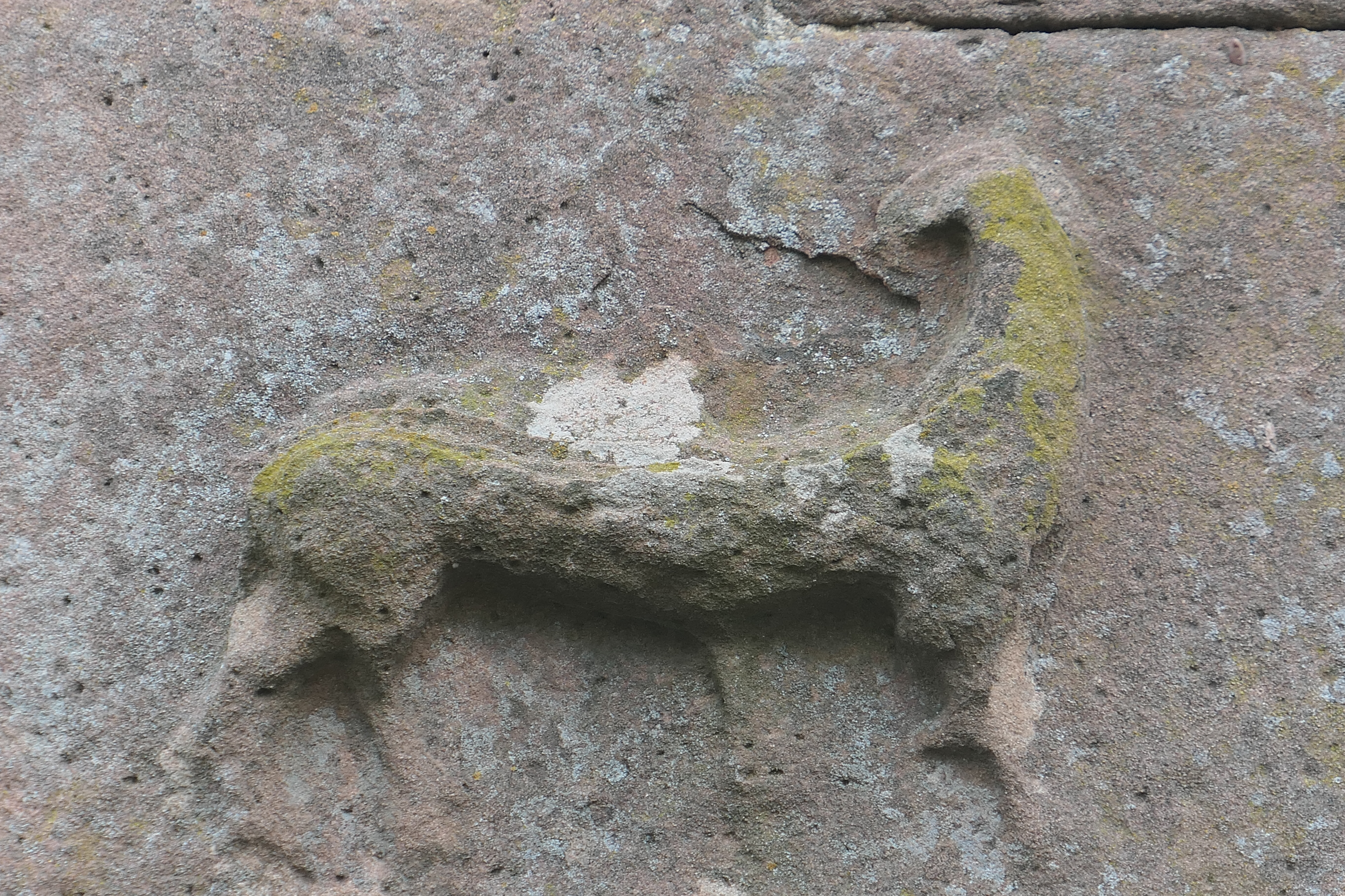 Romanesque church towers in Rhineland-Palatinate Wollmesheim ehemals St. Mauritius, Westturm 1094–1105 Detail Lammdarstellung